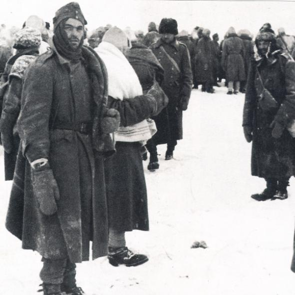 Soldati italiani durante la tragica ritirata dell'ARMIR